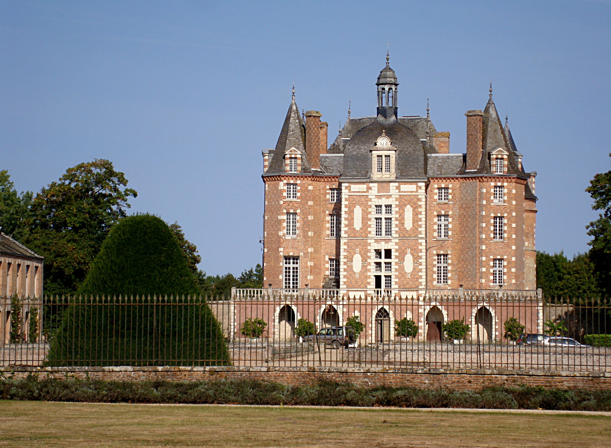 Le château de la Ferté-Imbault (Loir-et-Cher).